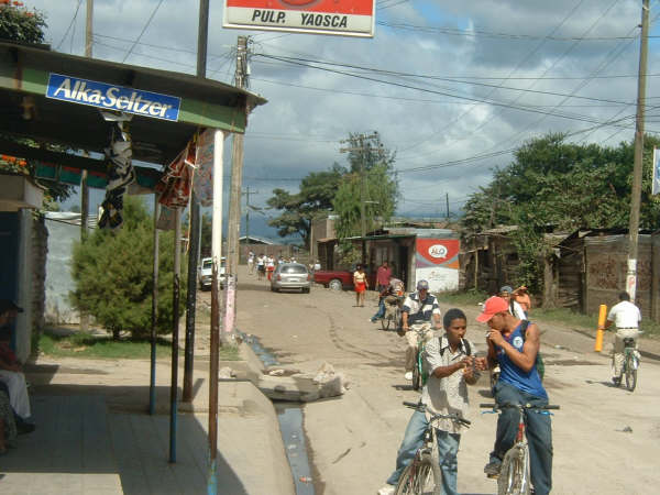 Rue de la ville de Esteli, Nicaragua. Auteur: Michel Gagnon, photo prise en décembre 2005 avec un appareil Fuji Finepix A203